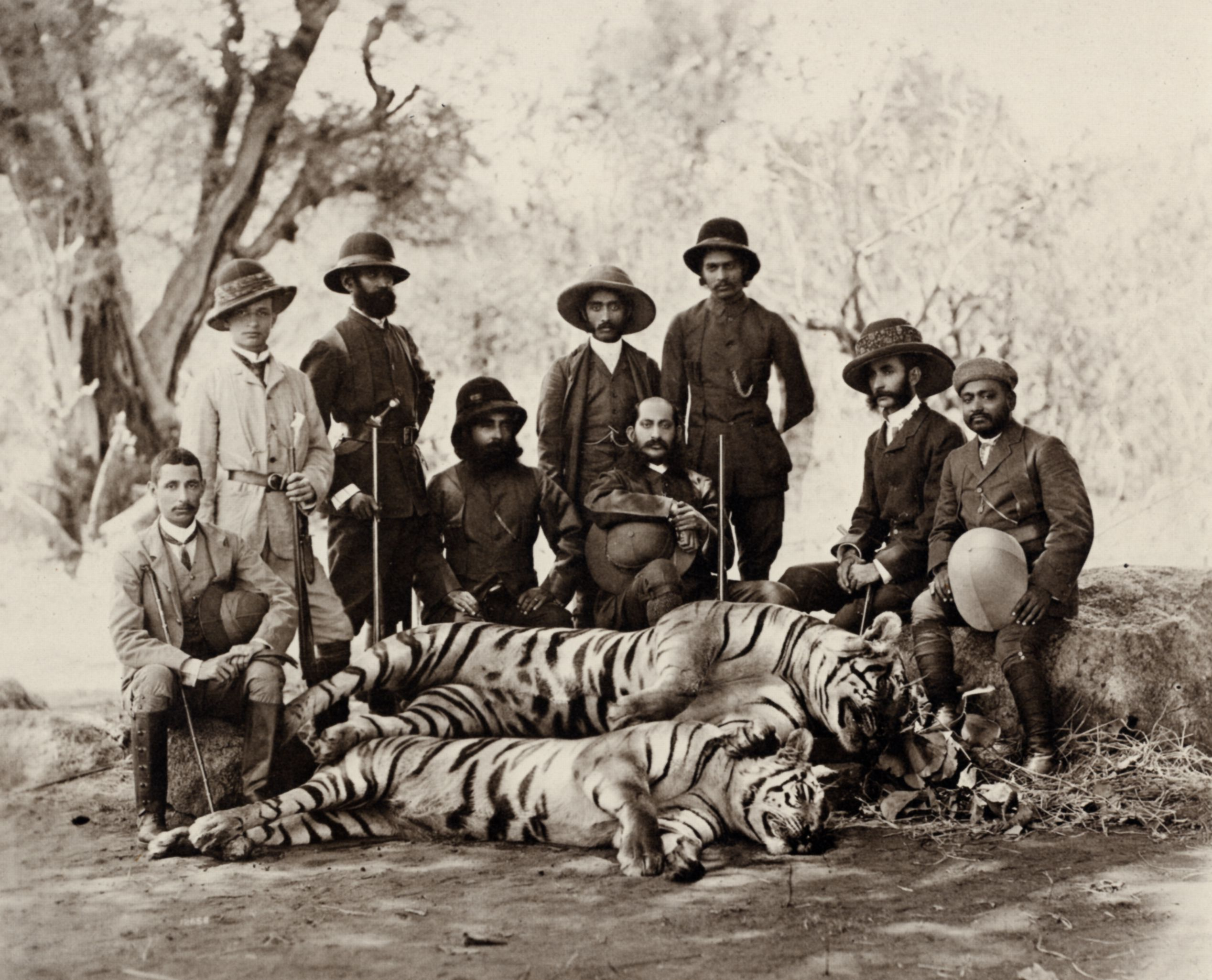 Dayal, Raja Lala Deen: H.H. der Nizam